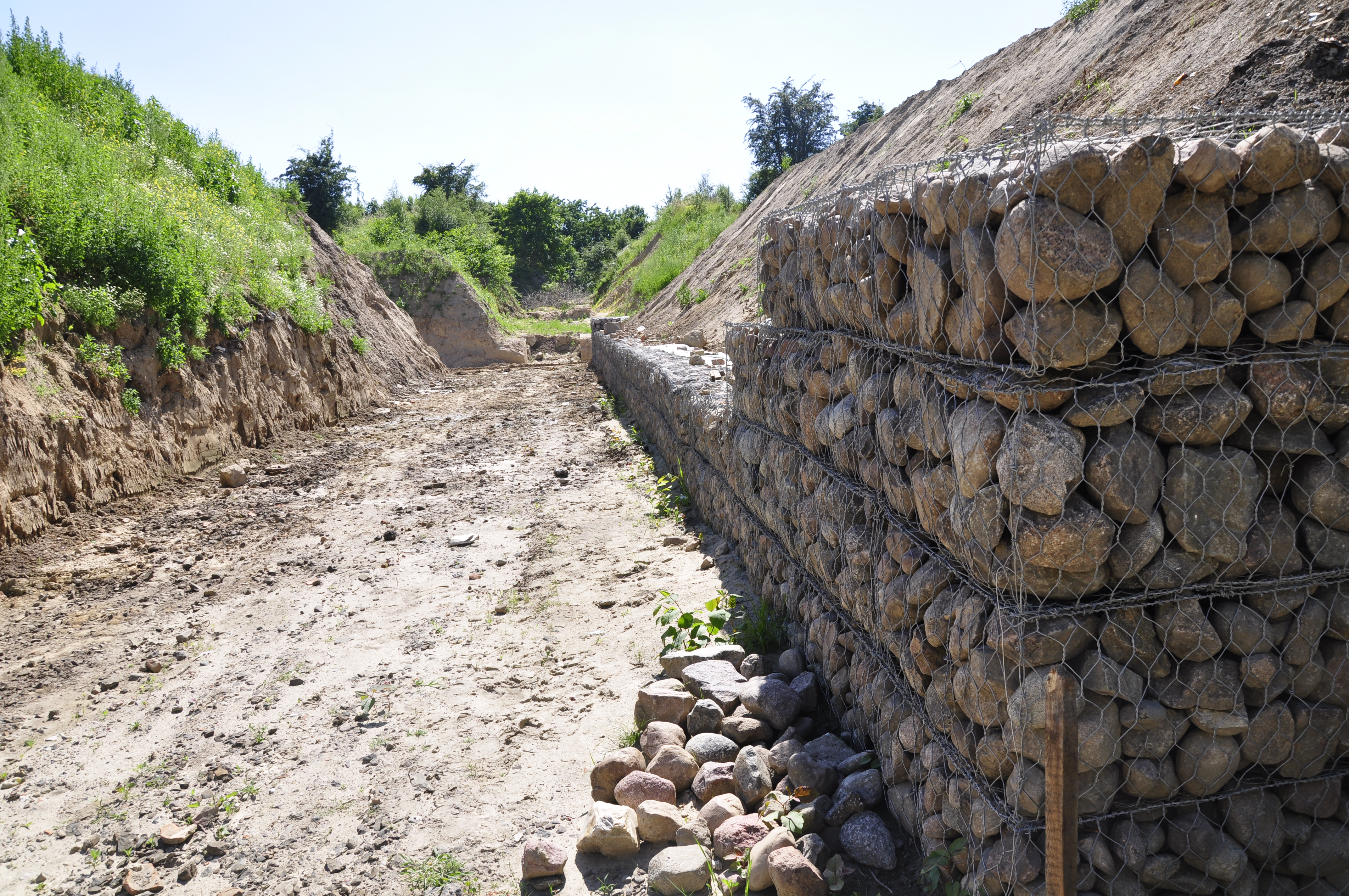 Fort V Warschau, Arbeiten zur Rekonstruktion ehemaliger Anlagen des Forts, Sommer 2010